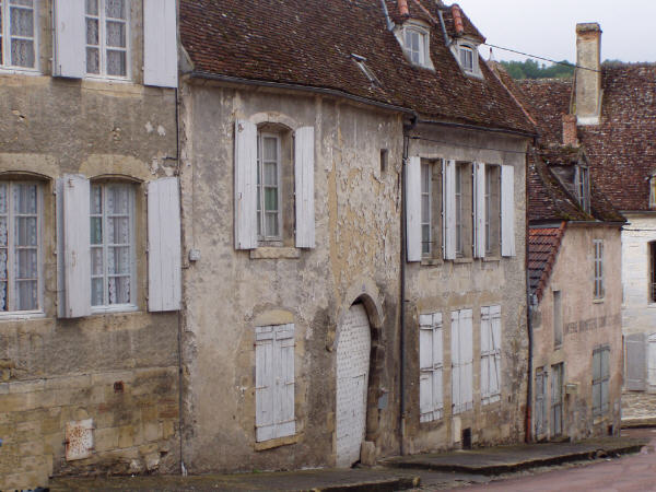 Varzy